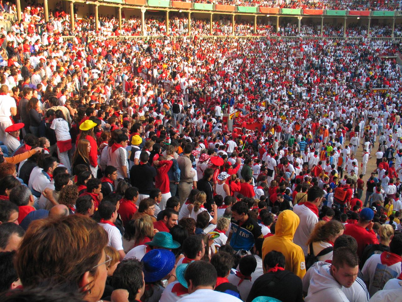 Pamplona.ws